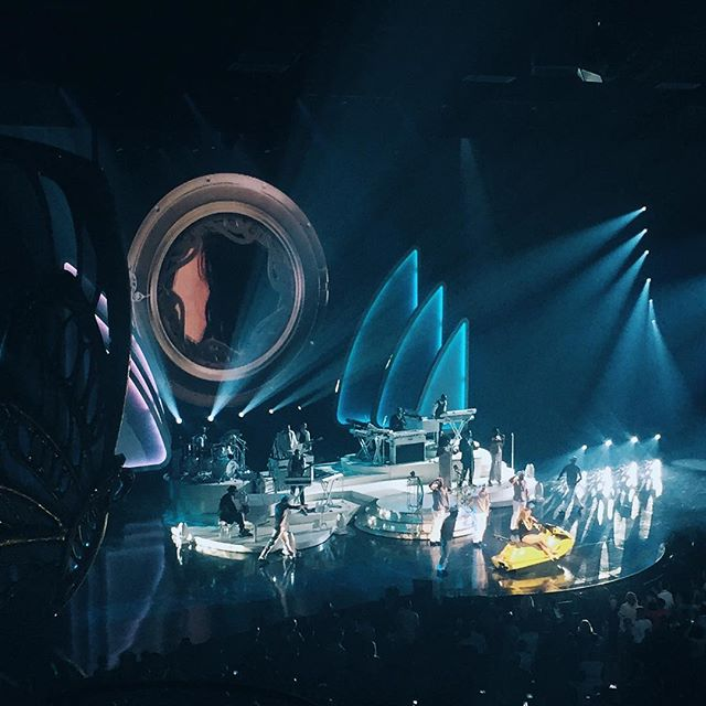 Imagen del espectáculo de Mariah Carey en Las Vegas (2015)